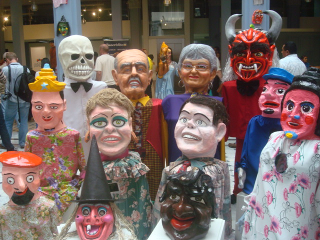 Exhibición de una mascarada tradicional costarricense en el Centro de Rescate del Patrimonio Nacional, 31 de octubre de 2013.